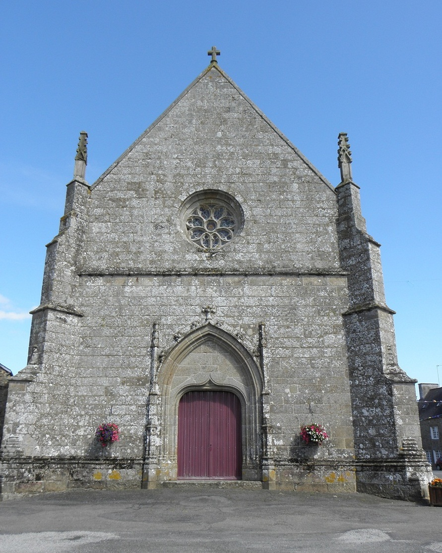 Façade occidentale de l'église Notre-Dame-de-Toutes-Joies à Broualan (35).